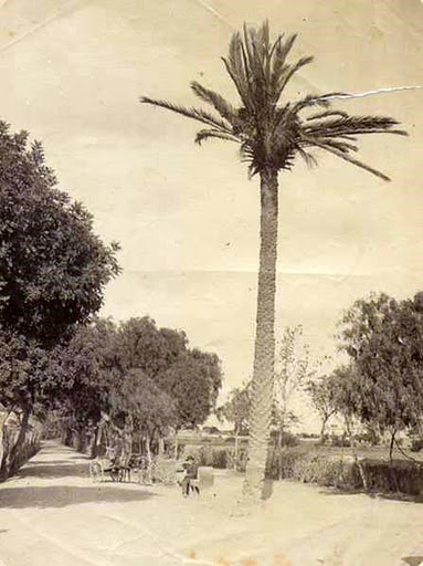 Rambla de Santa Cruz en 1888. En aquel entonces conocida como Rambla 11 de febrero